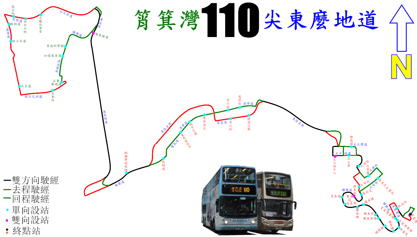 中文（香港）: 過海隧巴110線的走線圖